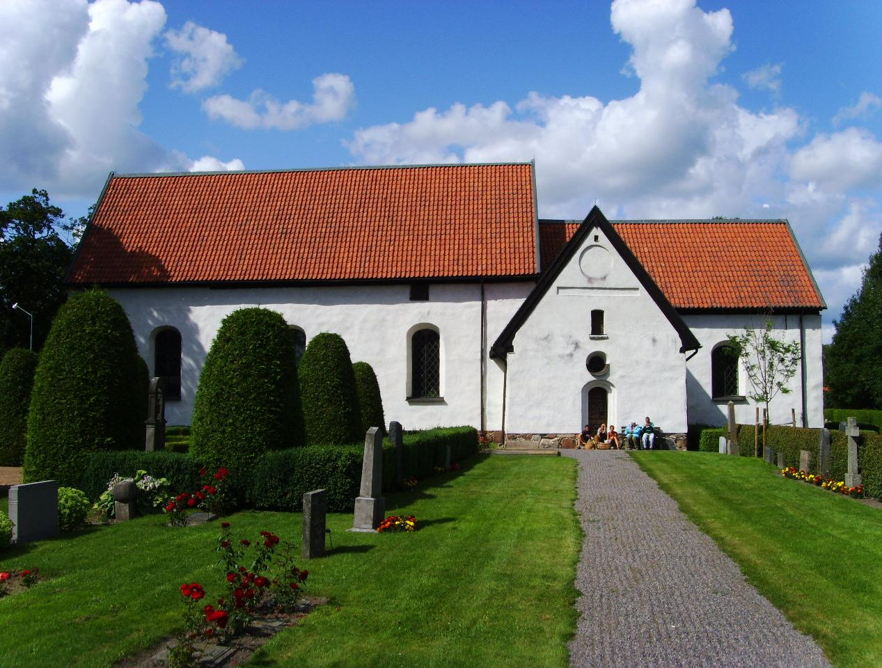 Södra fasaden.